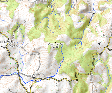 carte réalisée sur umap This map may be incomplete, and may contain errors. Don't rely solely on it for navigation.